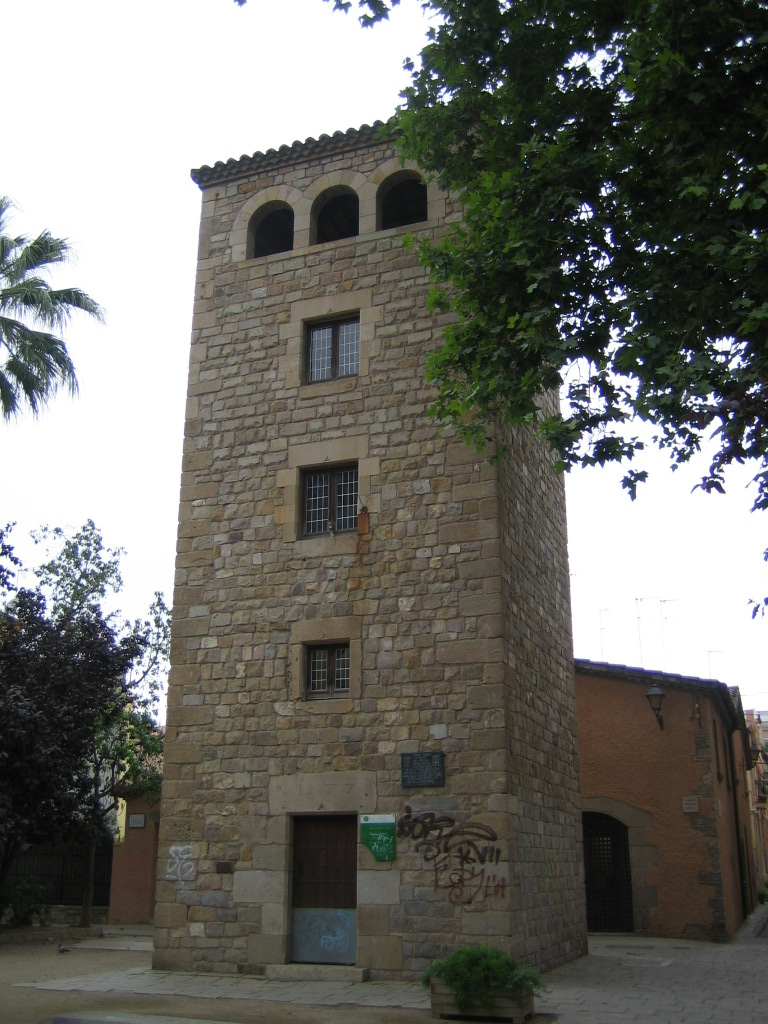 Foto hecha por mi desde la calle Barcelona en horizontal hacia el oeste, el Viernes 08 de Julio del 2005 a las 10:53 de la mañana. Con la cámara CANON ixus 40